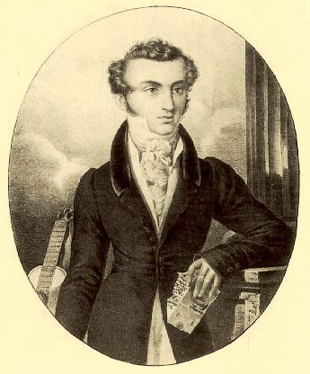 Корсаков Н. А.